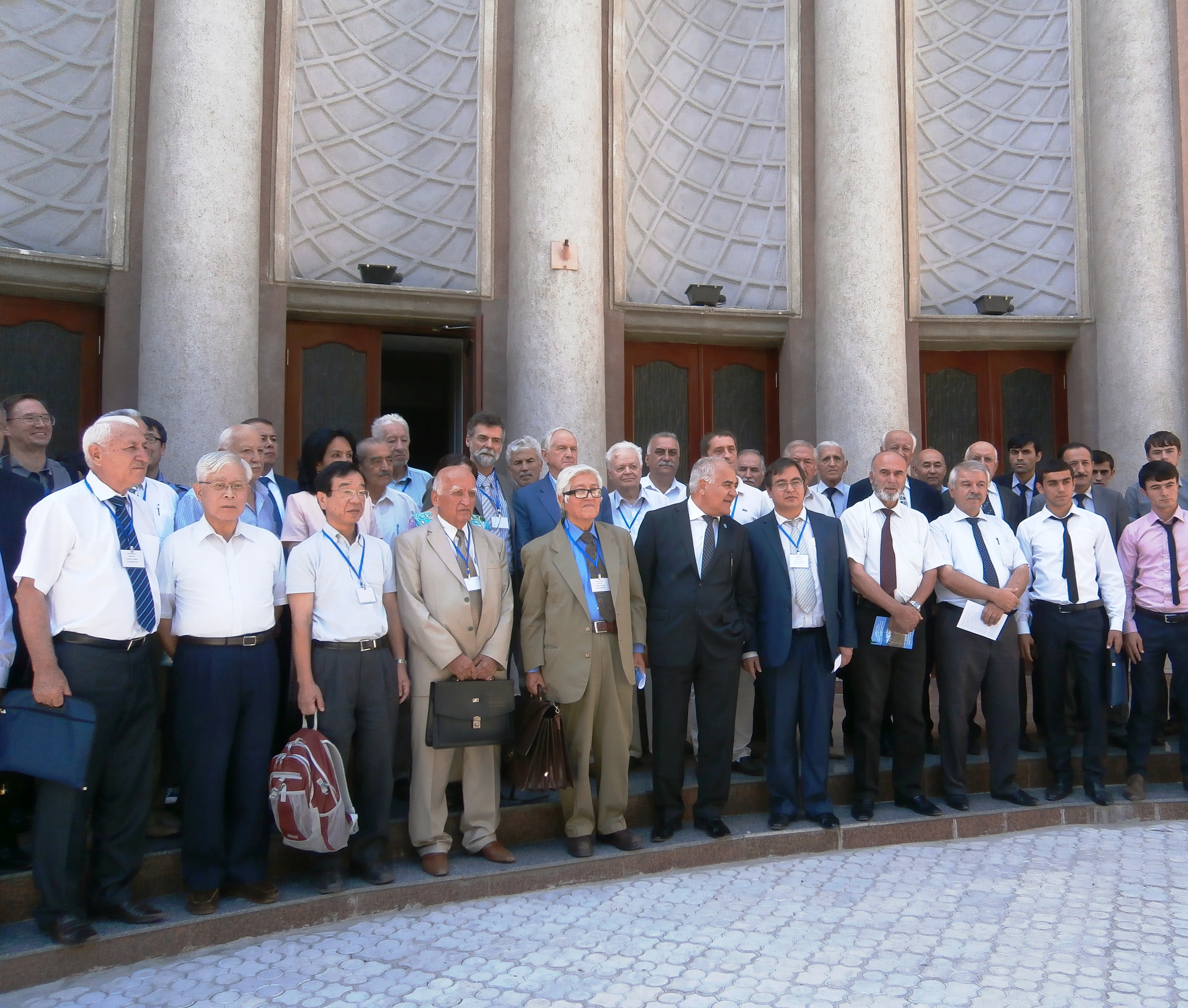 Участники конференции в Физико-Техническом НИИ Академии наук Таджикистана